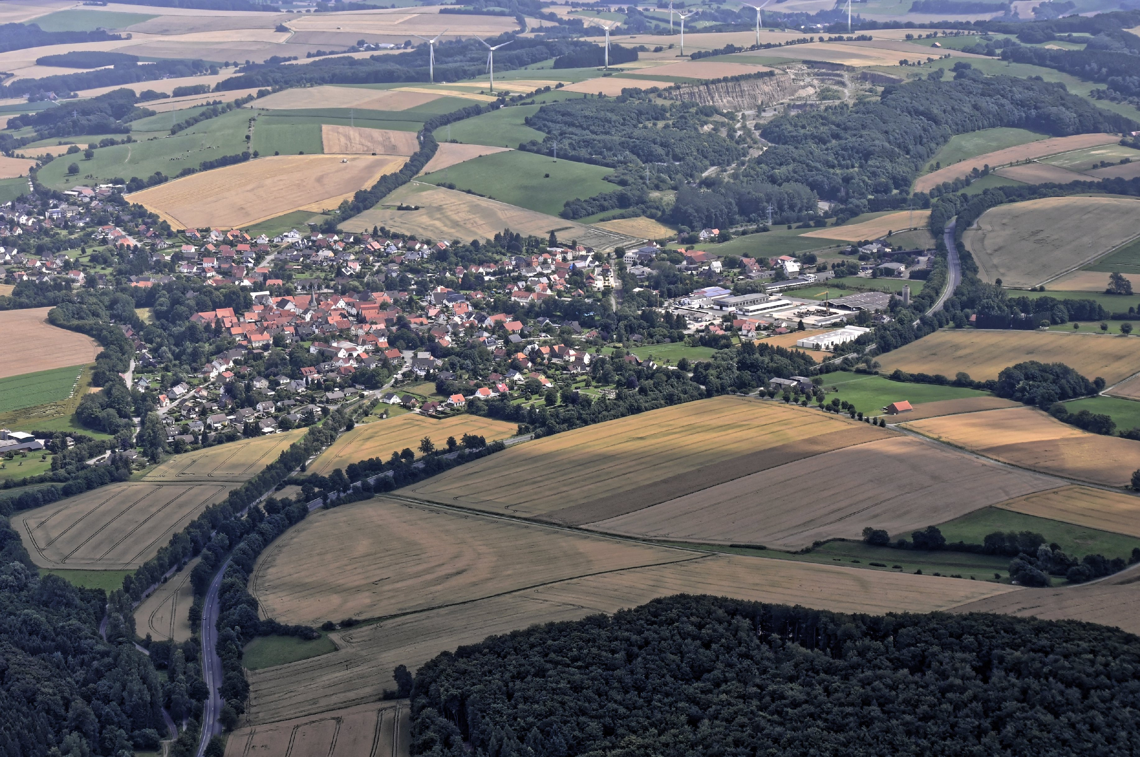 Bilder vom Flug Nordholz-Hammelburg 2015: Alverdissen